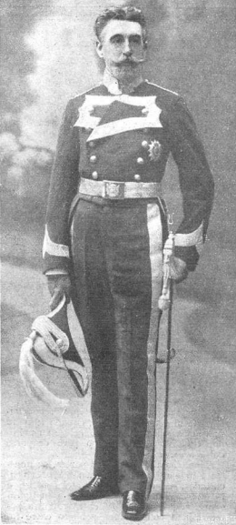 Retrato de Fernando Ramírez de Haro y Patiño, XIII conde de Villariezo y después XIII conde de Bornos, grande de España. Obra del fotógrafo Christian Franzen, recogido en la revista Mundo Gráfico.